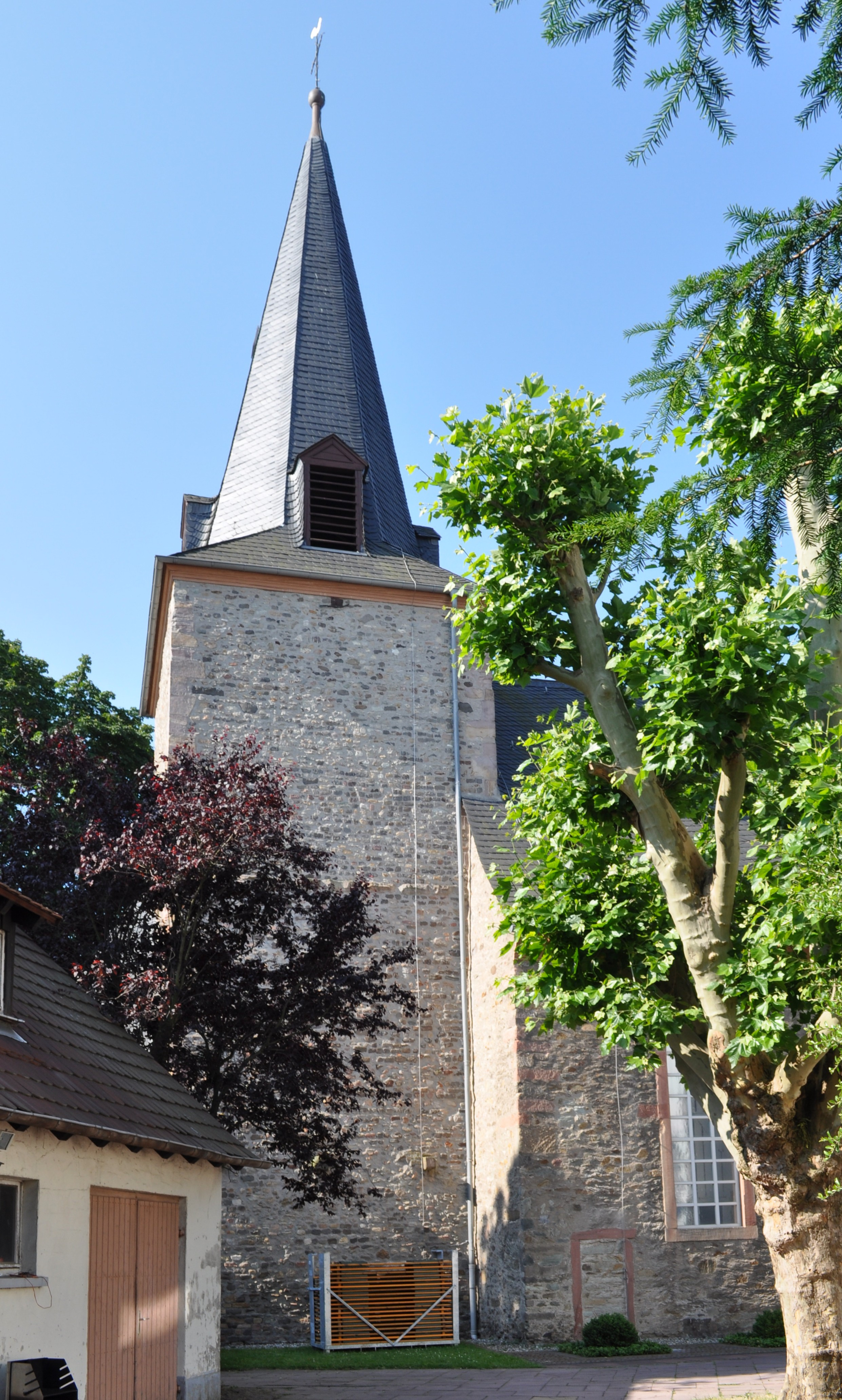 Kirchturm der evangelischen Kirche Sulzbach (Taunus)